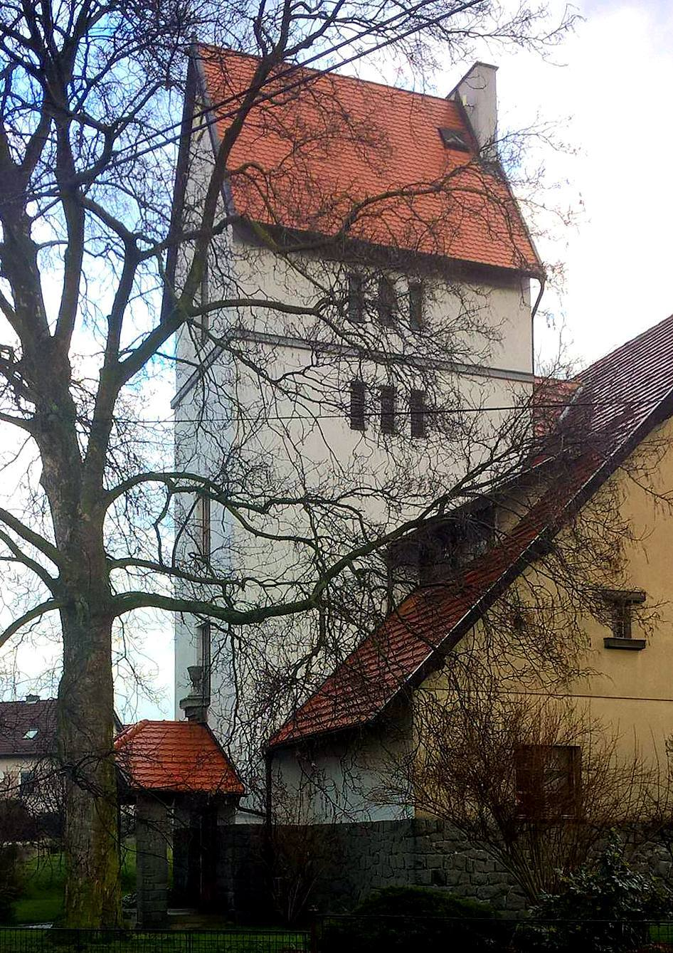 Chrám mistra Jana Husa